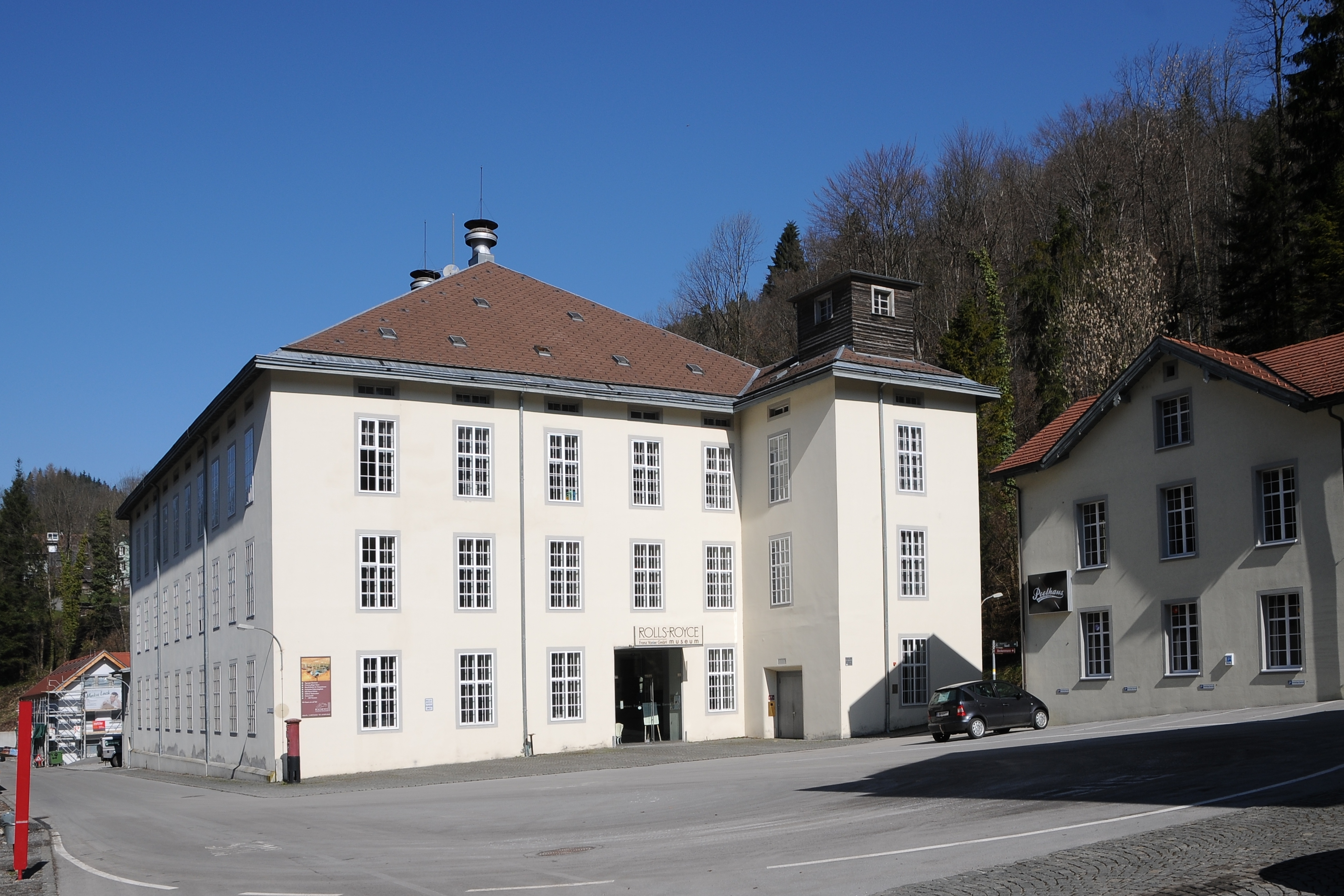 Das Rolls-Royce-Museum im Gütle, Dornbirn, Vorarlberg; ehemals ein Teil der Textilfabrik F.M.Hämmerle.